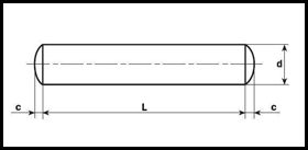 DIN 7